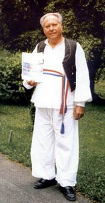 Ivan Benak